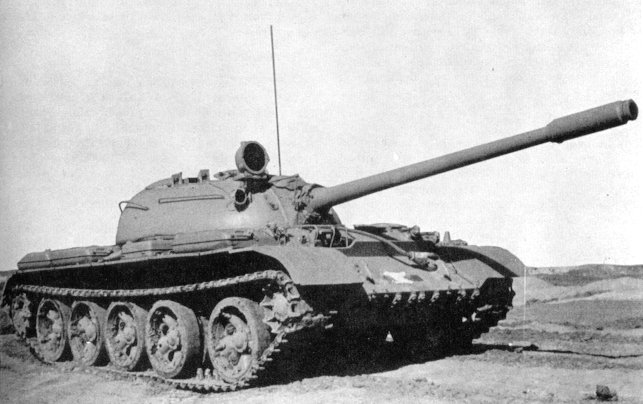 Soviet T-55 medium tank.